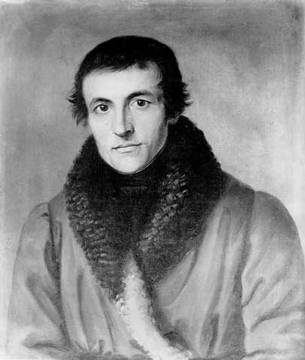 Ritratto di Johann Adam Möhler (1796-1838), Kunstakademie, Düsseldorf